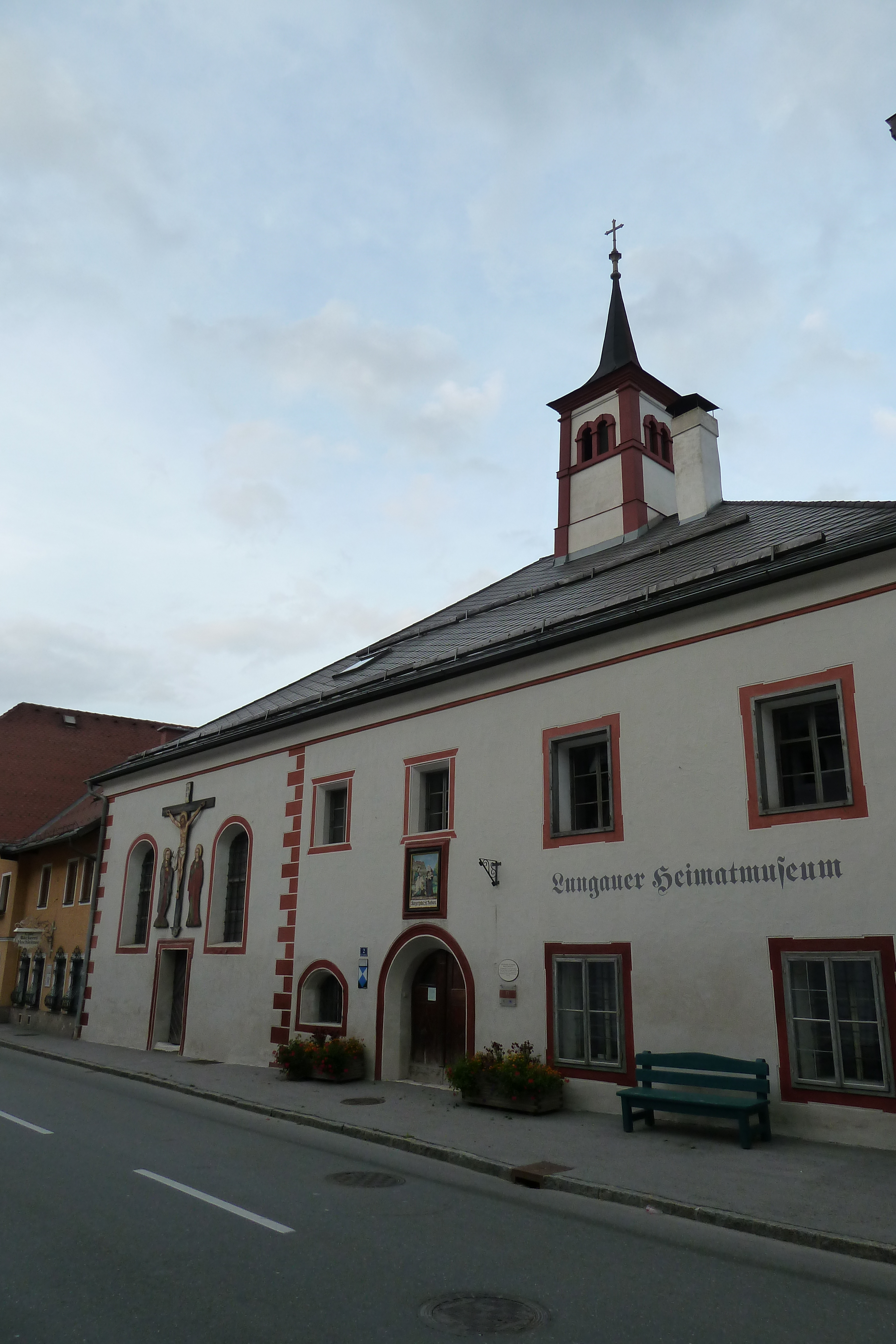 Ehem. Barbaraspital, heute Lungauer Heimatmuseum